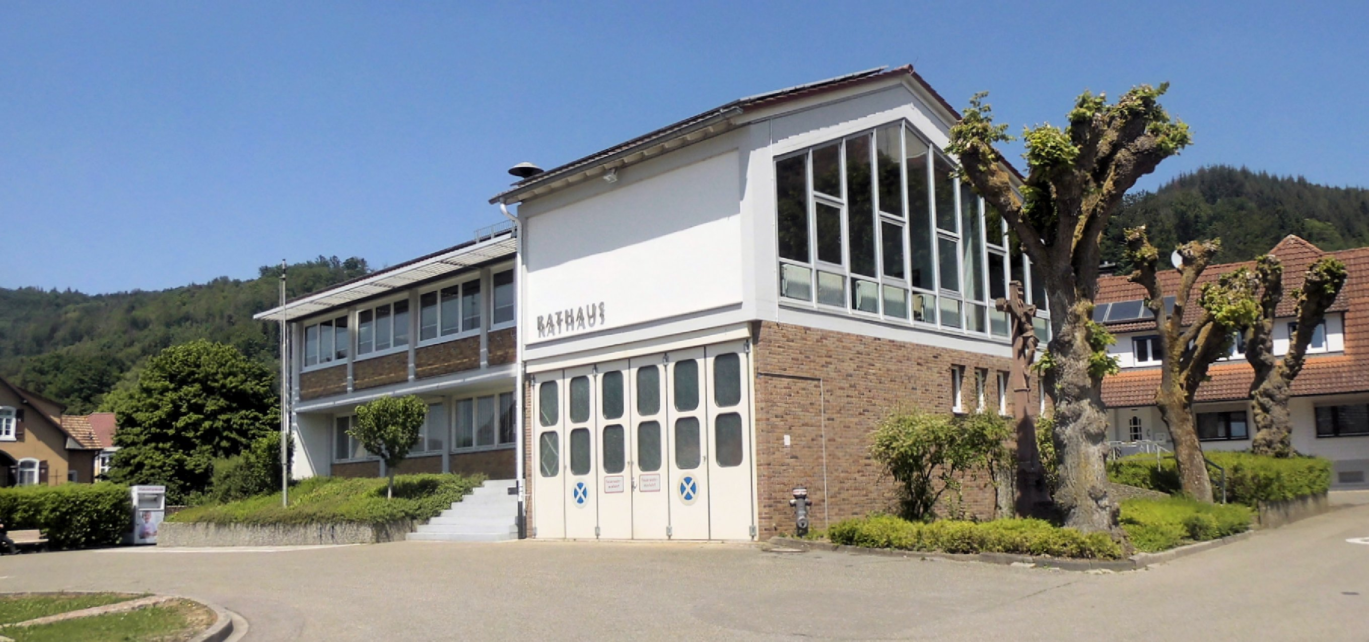 Rathaus (heute Ortsverwaltung) der ehemaligen Gemeinde Kuhbach, Stadt Lahr/Schwarzwald, Deutschland